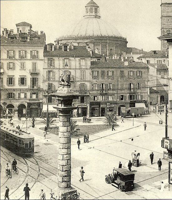 Milano, largo San Babila